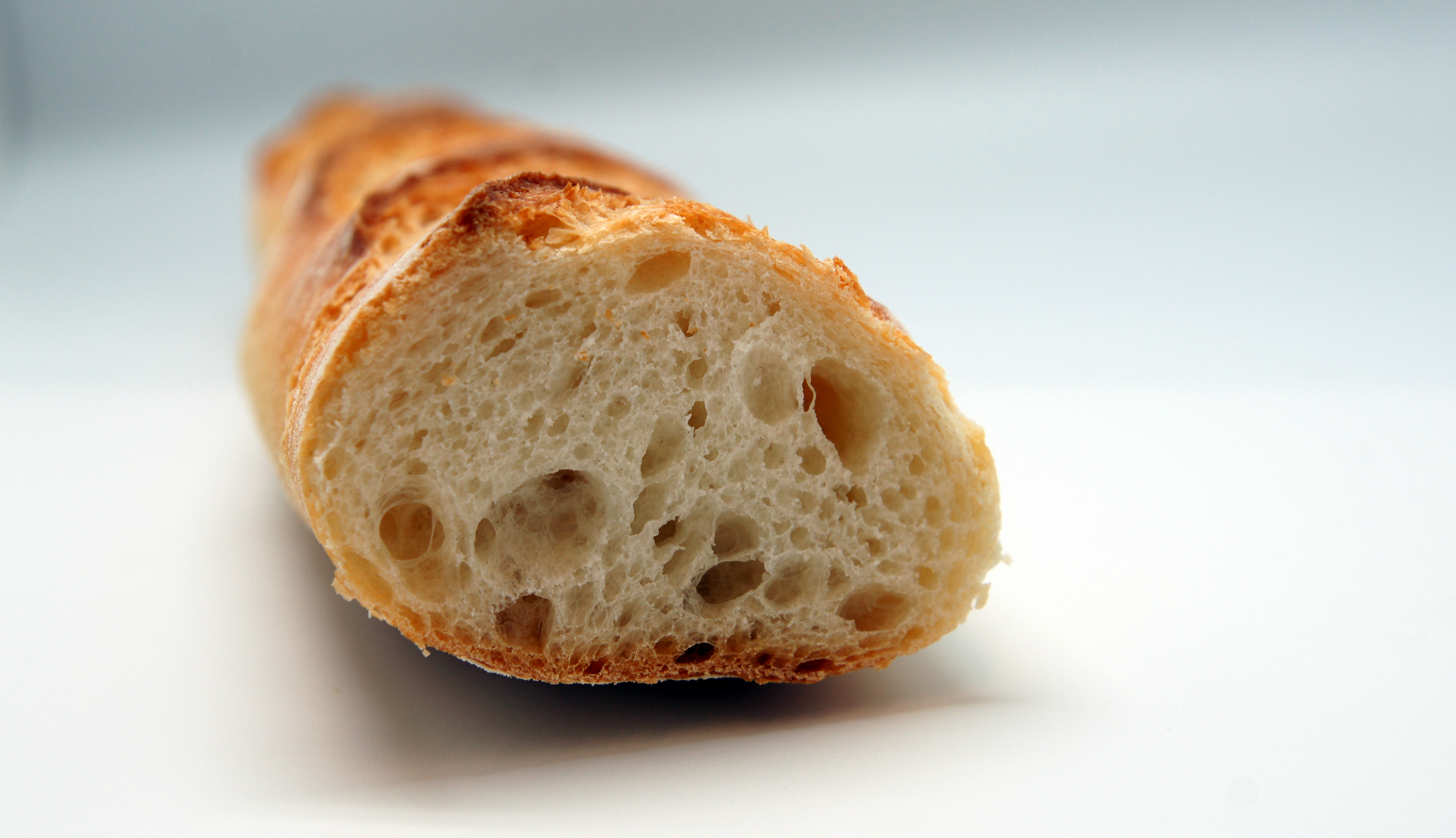 Closeup view of a cut baguette showing the inner structure.